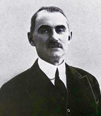 Barbu Stirbey